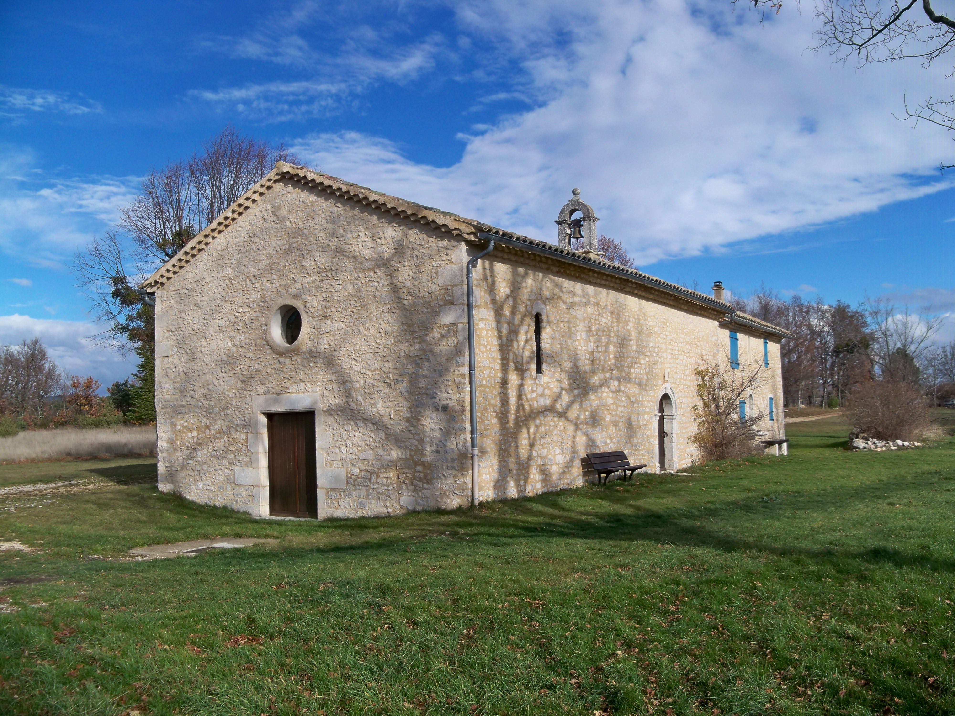 Chapelle Notre Dame de l'Origuière, à Revest du Bion